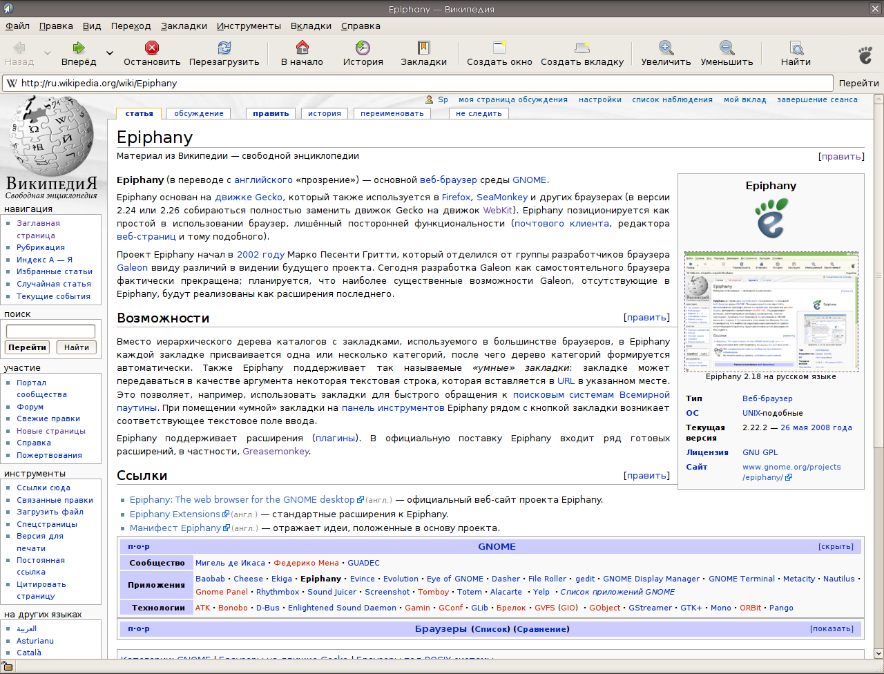 Веб-браузер Epiphany 2.22.2 в среде GNOME под управлением Ubuntu Linux, с русскоязычным интерфейсом пользователя.